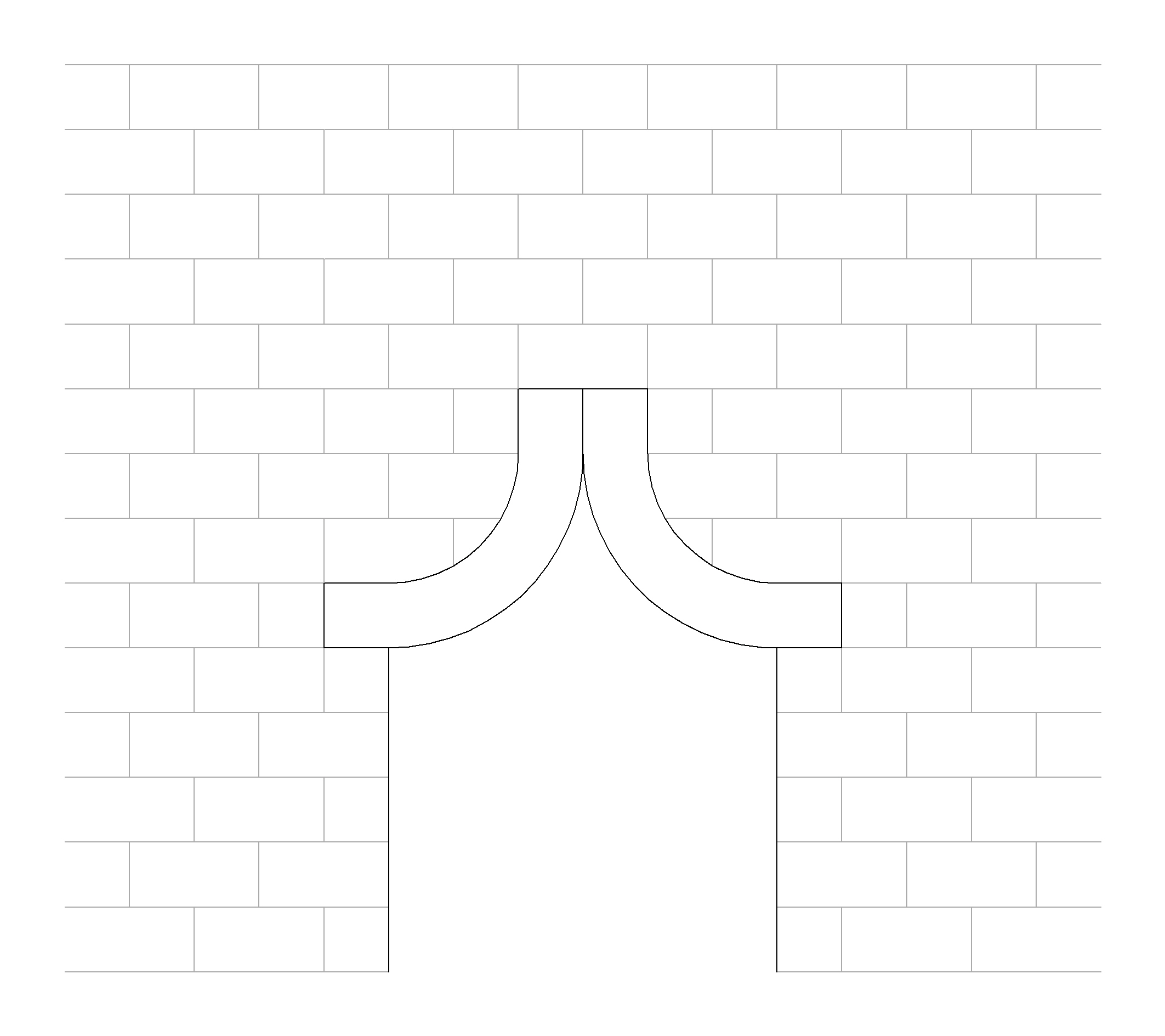 Vorhangbogen